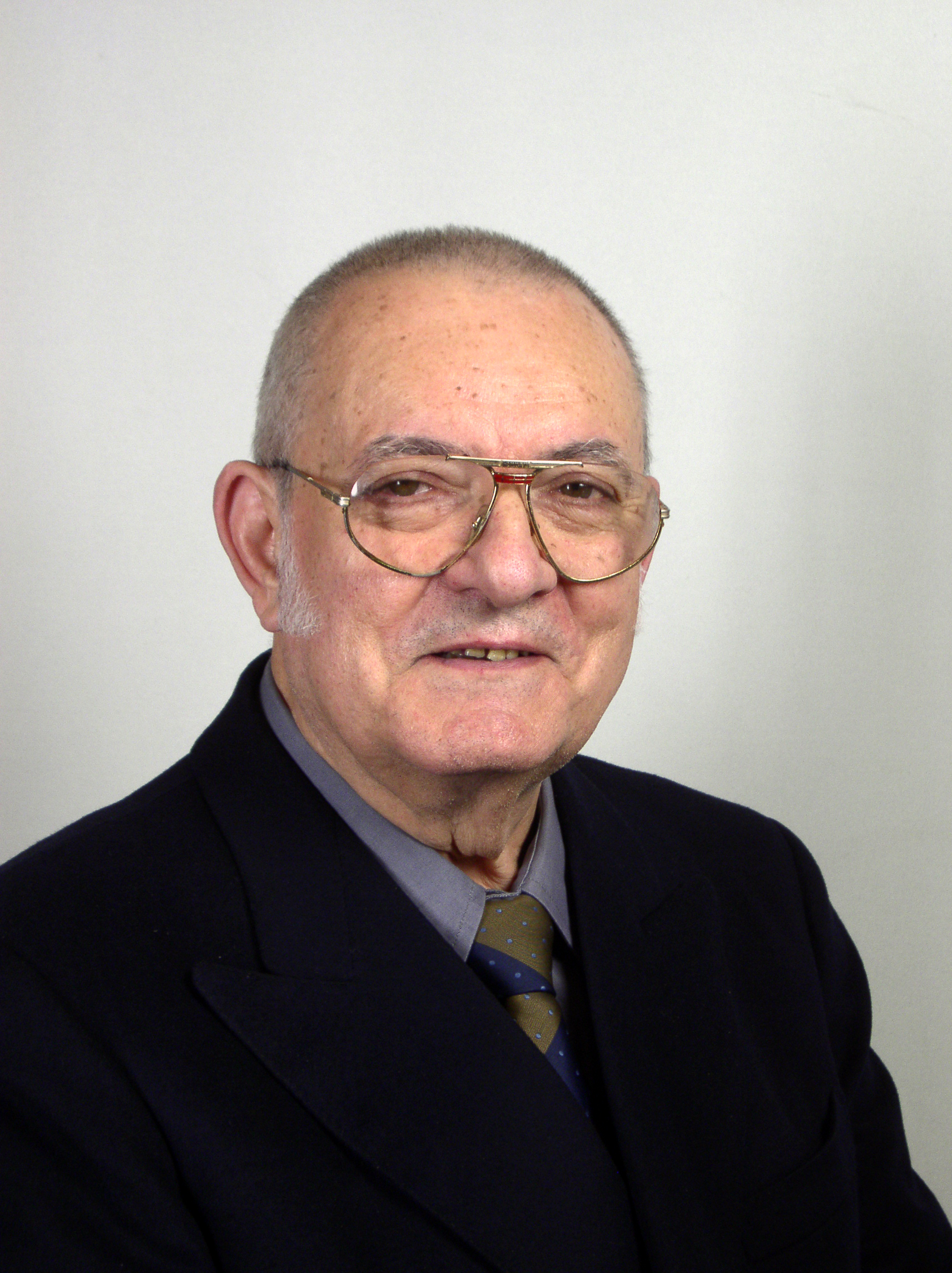 Foto di Bartolomeo Aloia